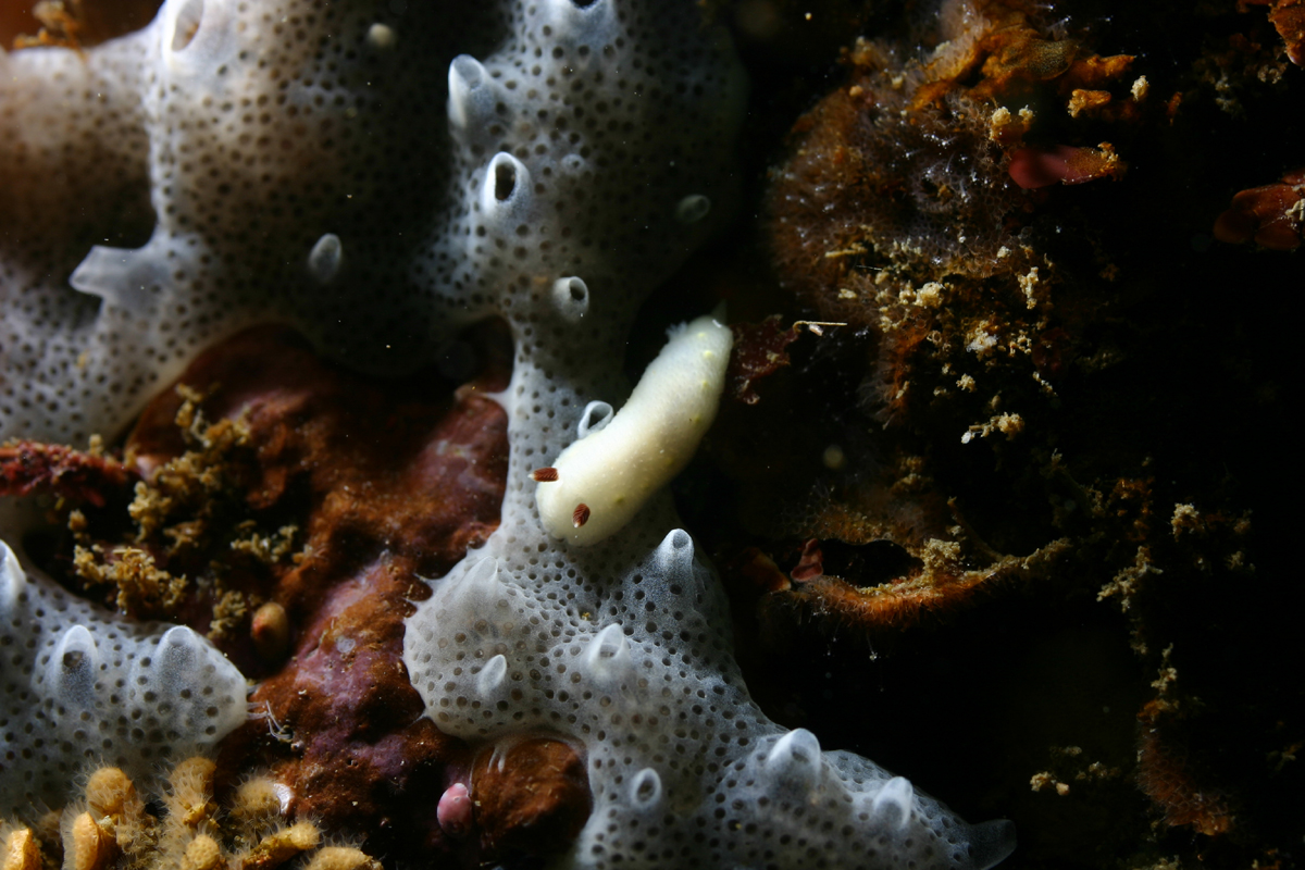 Cadlina flavomaculata